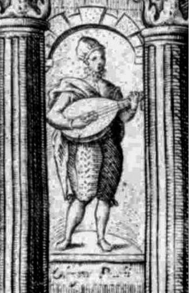 Giovanni Picchi jouant du luth sur la page de garde de la Nobiltà di Dame (Venise, 1600) de Fabritio Caroso